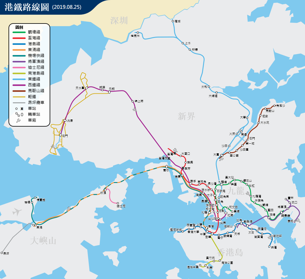 中文（香港）: 香港港鐵的PNG路綫圖繁體中文，有x標記的車站代表在2019年8月25日因應荃葵青遊行舉行而關閉的車站。